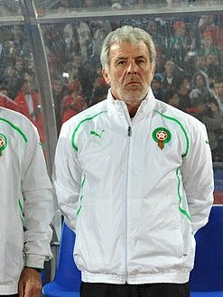 Eric Gerets (crop) Maroc- Niger (2011).